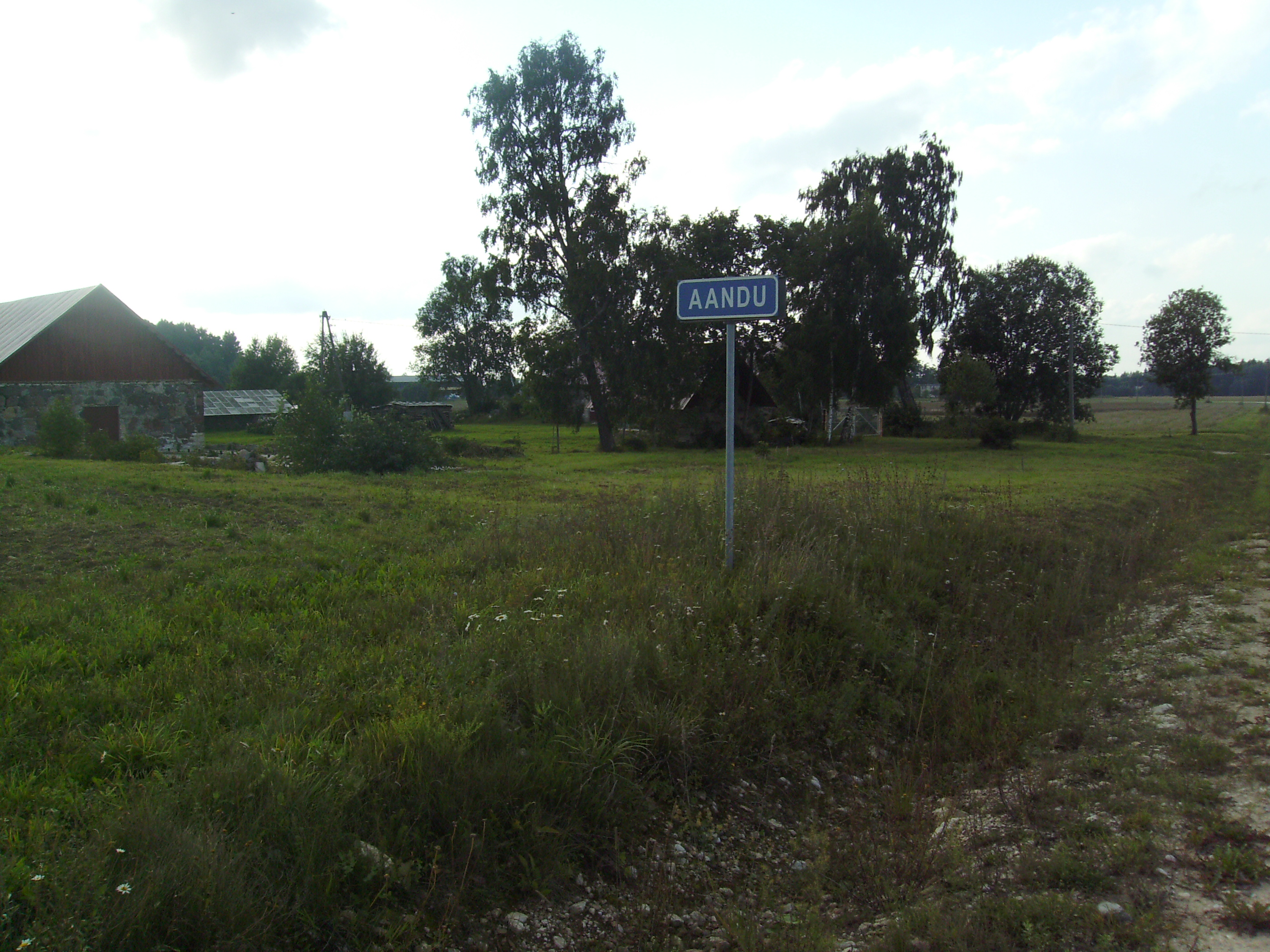 Деревня Аанду.